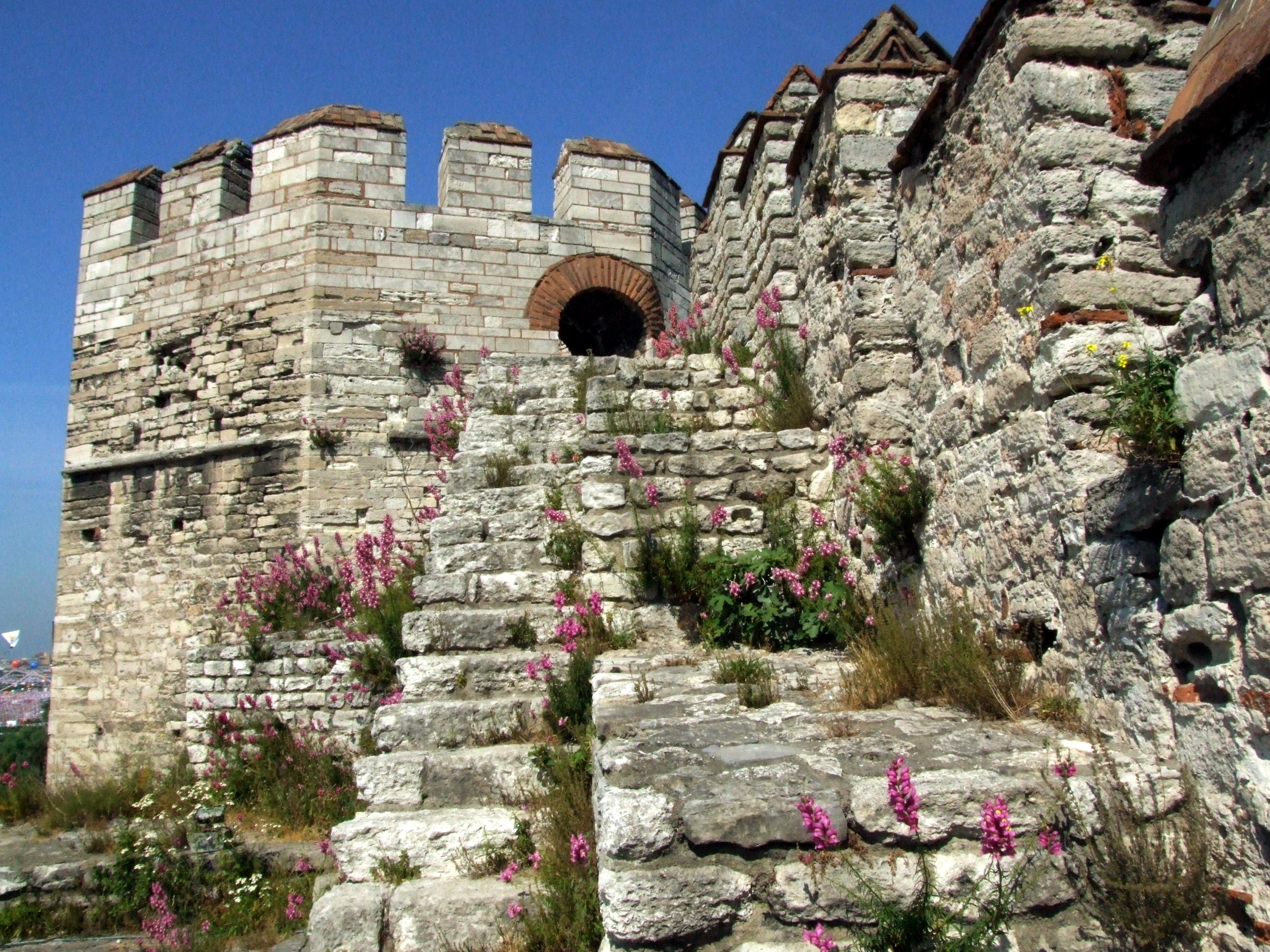 Yedikule hisari, Istanbul